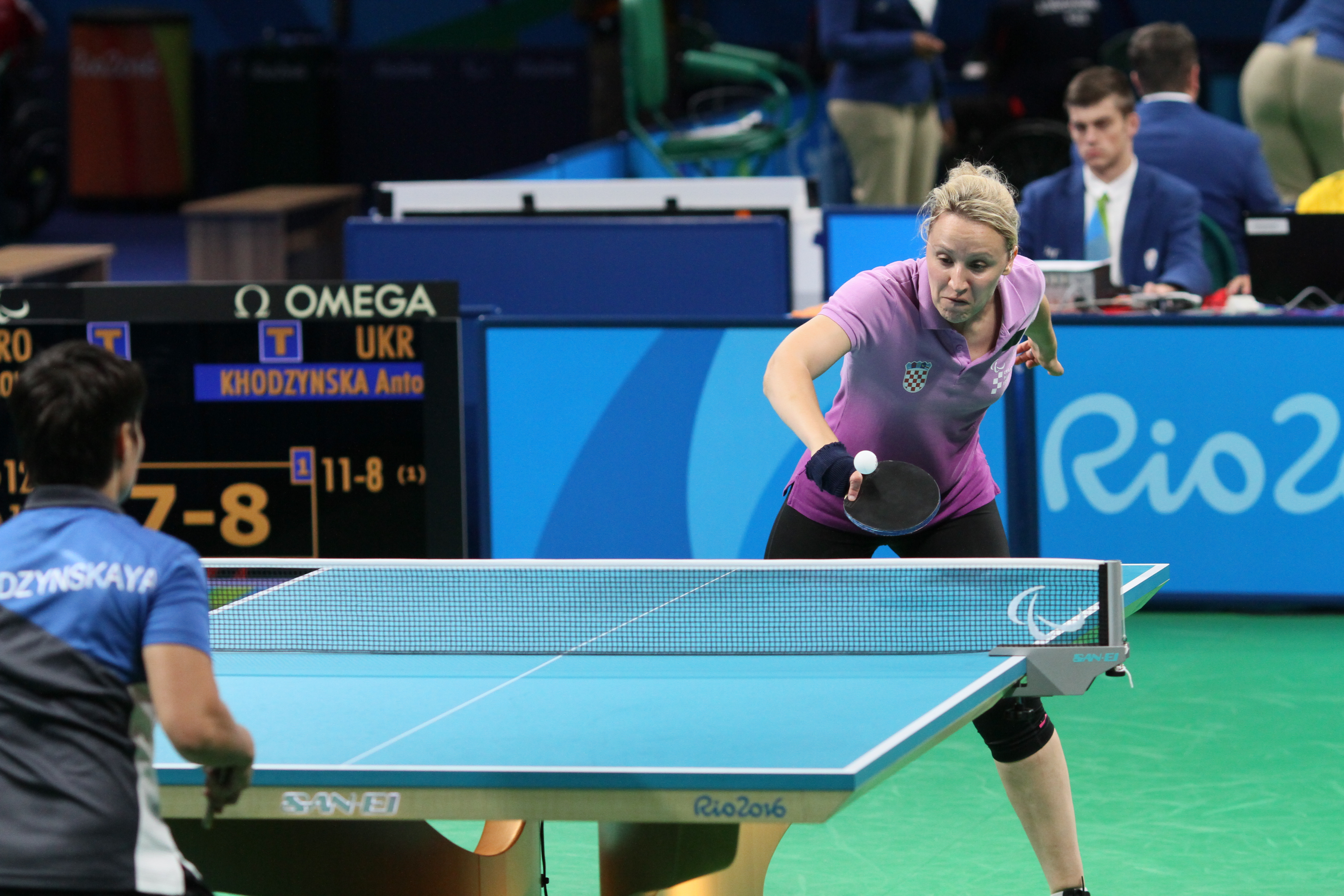 Sandra Paovic aux Jeux paralympiques d'été de 2016.